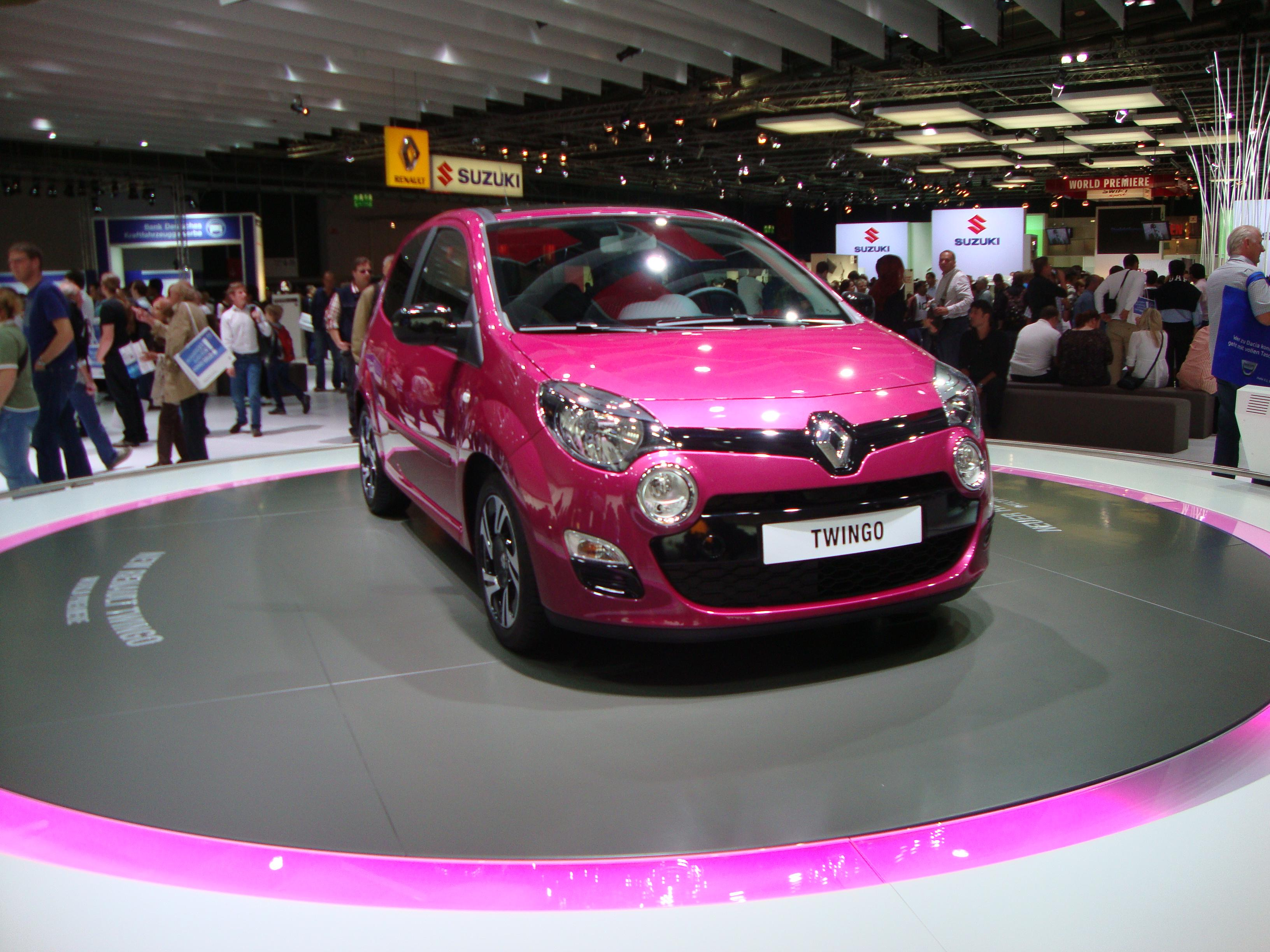 IAA Frankfurt